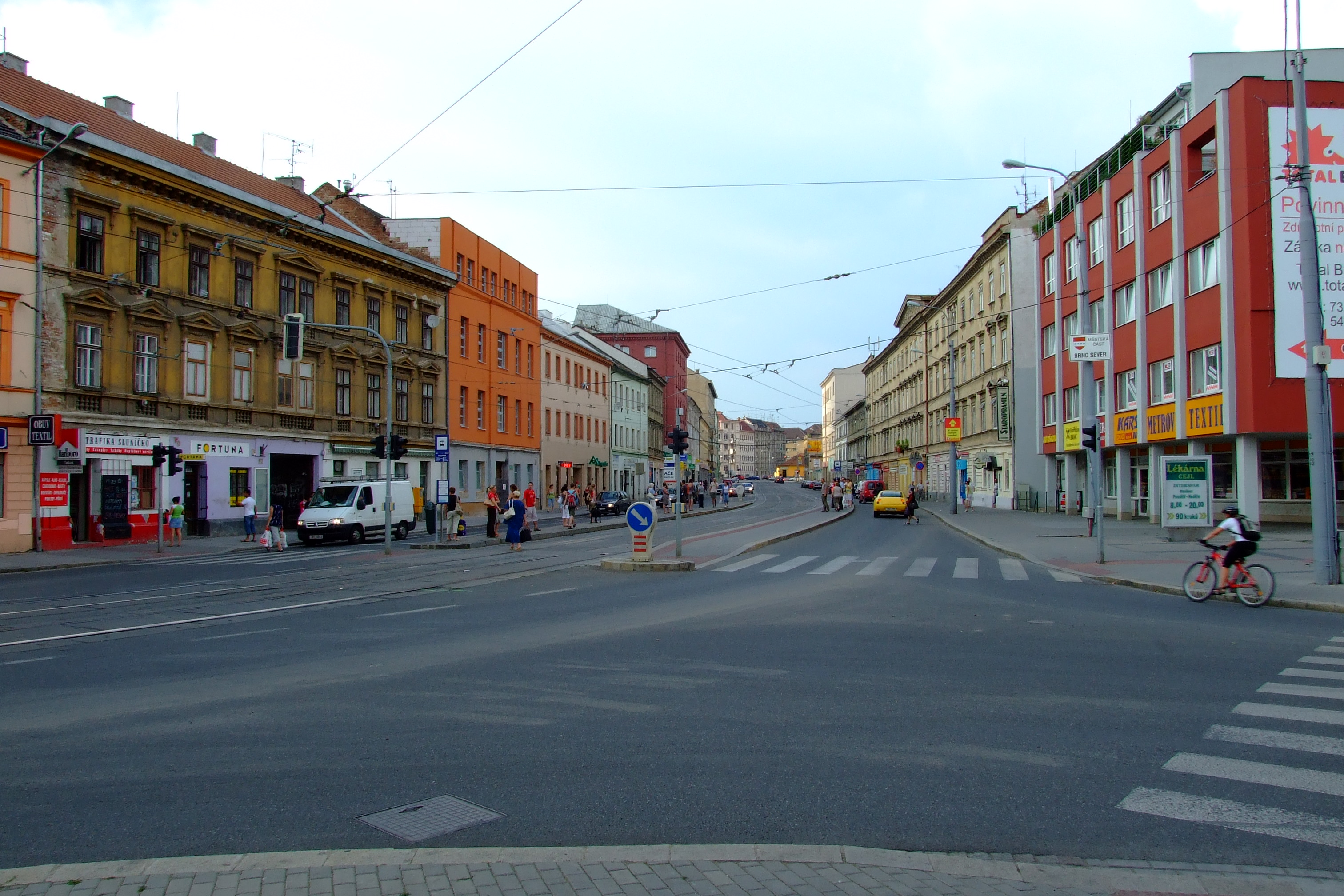 Brno-Zábrdovice - část ulice Cejl patřící pod Brno-sever